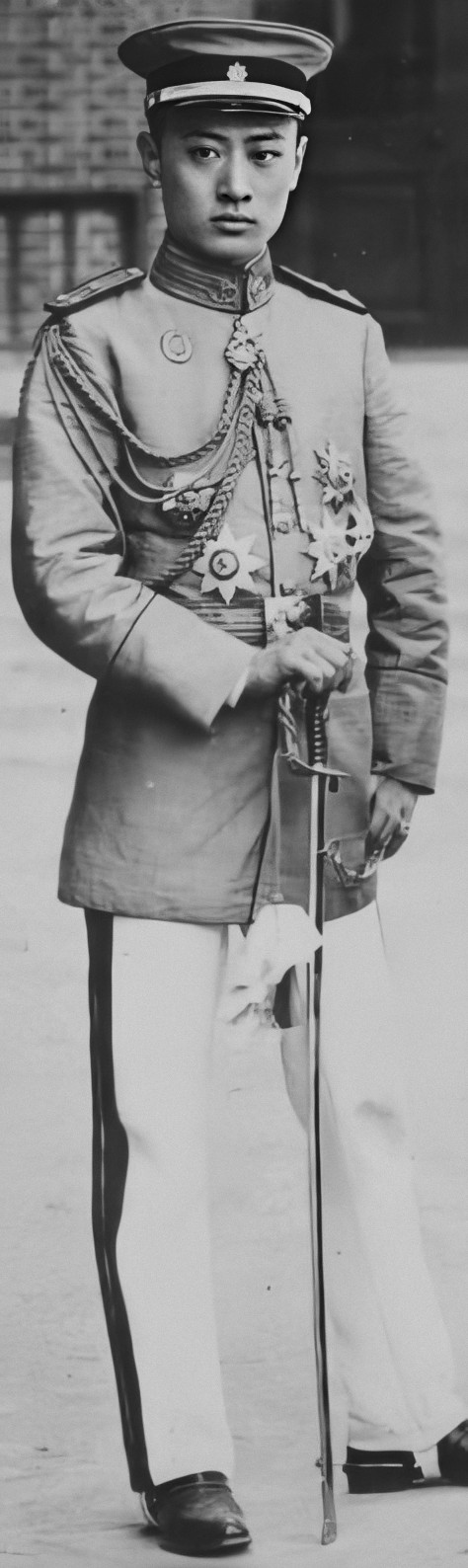 中文（中国大陆）: 載𢱿军装照